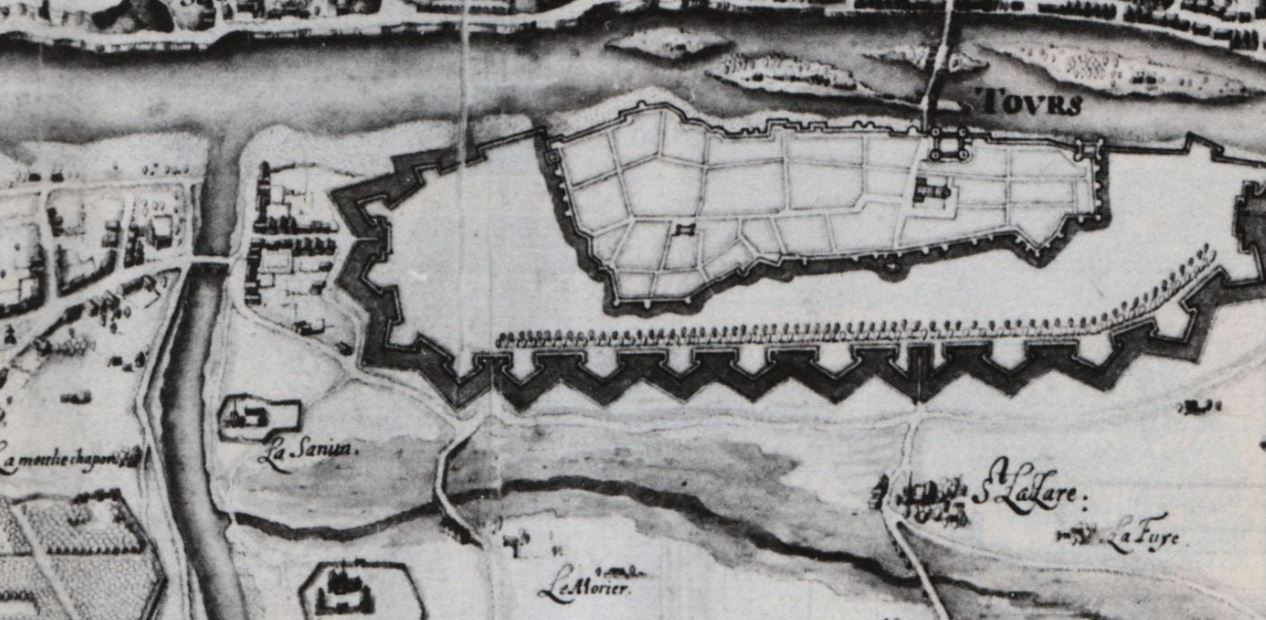 Cartes et plan figurant la ville de Tours en 1619. Archives départementales d'Indre-et-Loire.